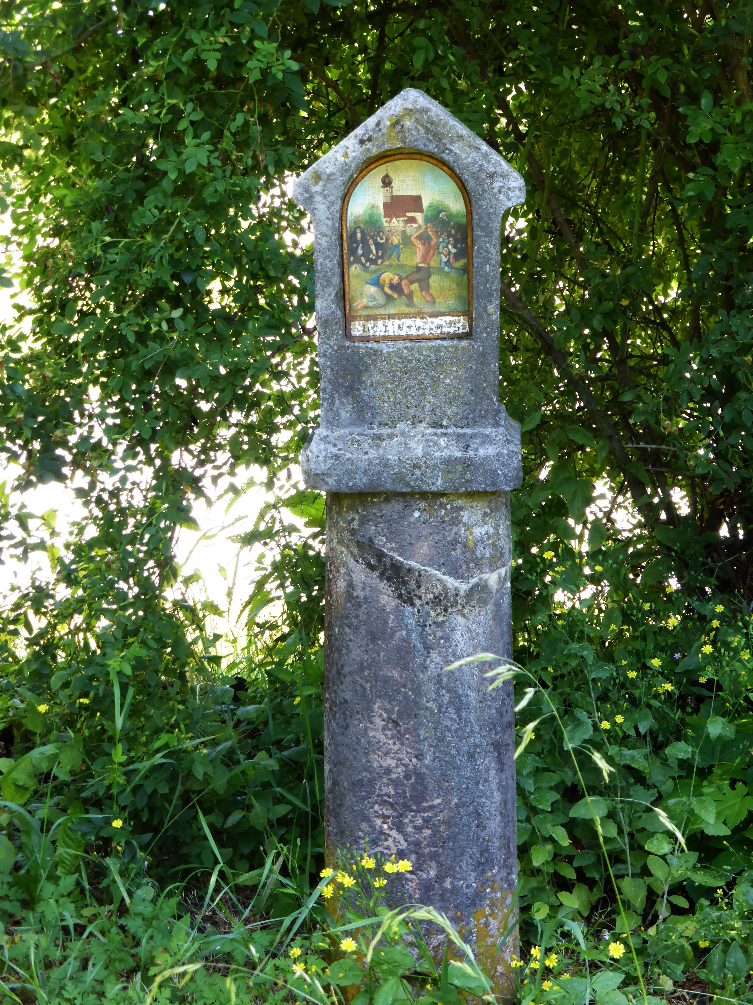 Richtstätte in Astätt